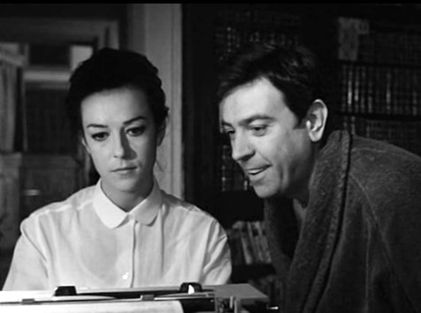 screenshot from La cina è vicina (1967)